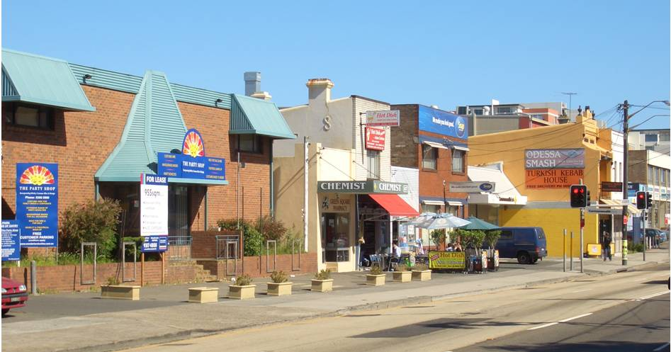 Beaconsfield